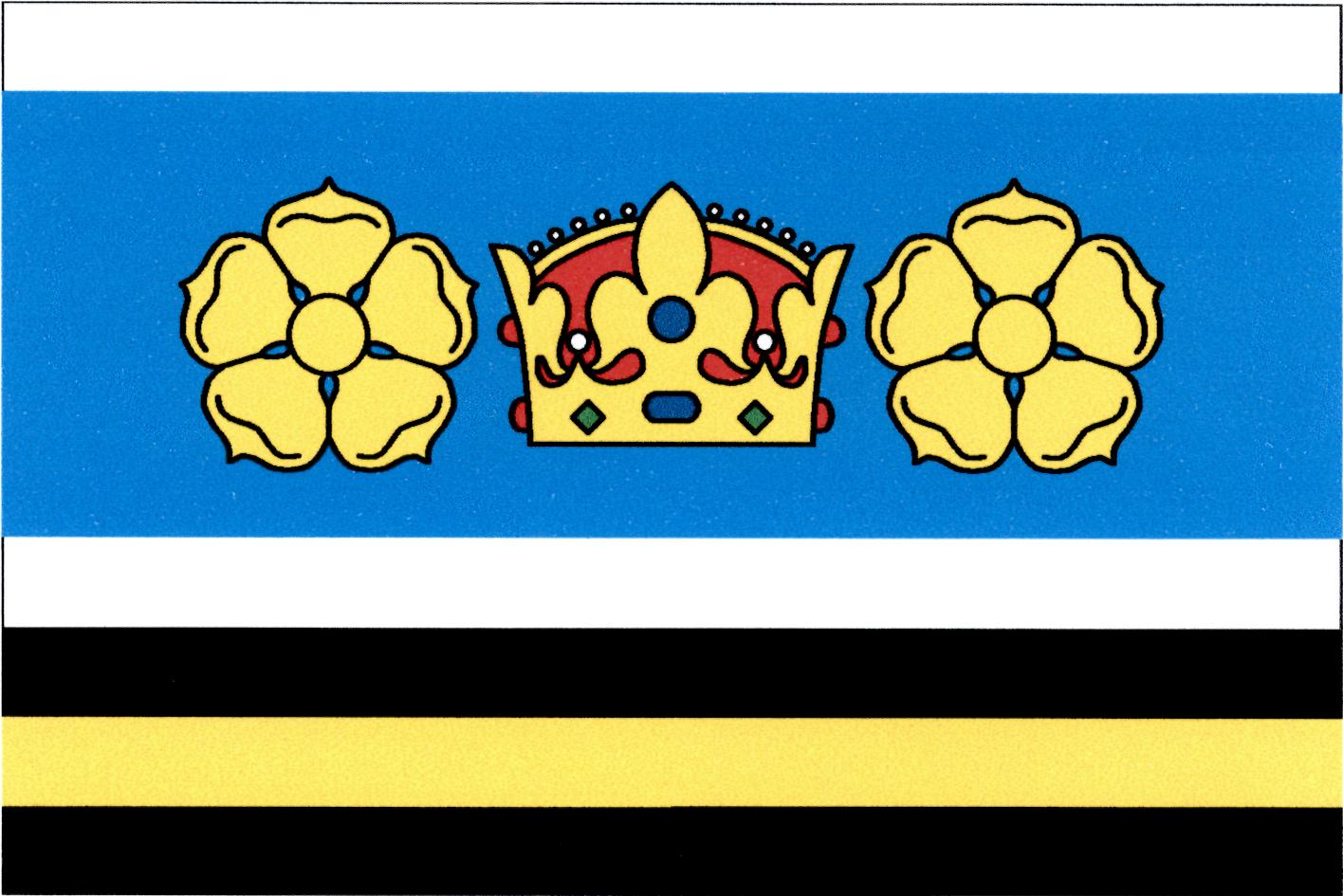 Vlajka obce Keblov